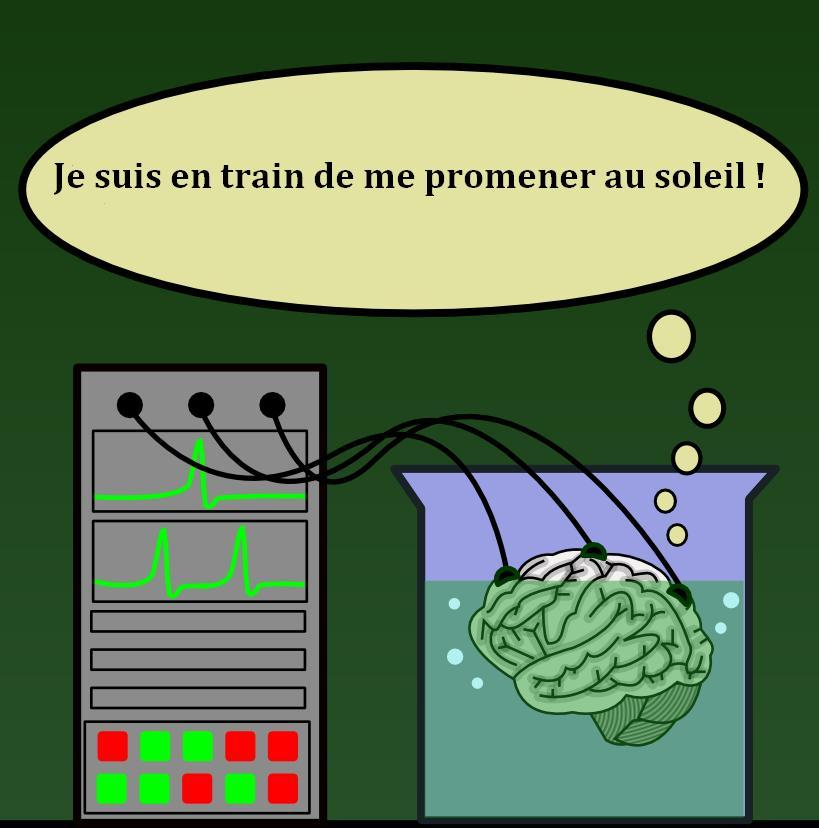 Version française de l'image File:Barin in a vat (en) v2.png. Illustration de l'expérience de pensée imaginée par le philosophe américain Hilary Putnam en 1981.